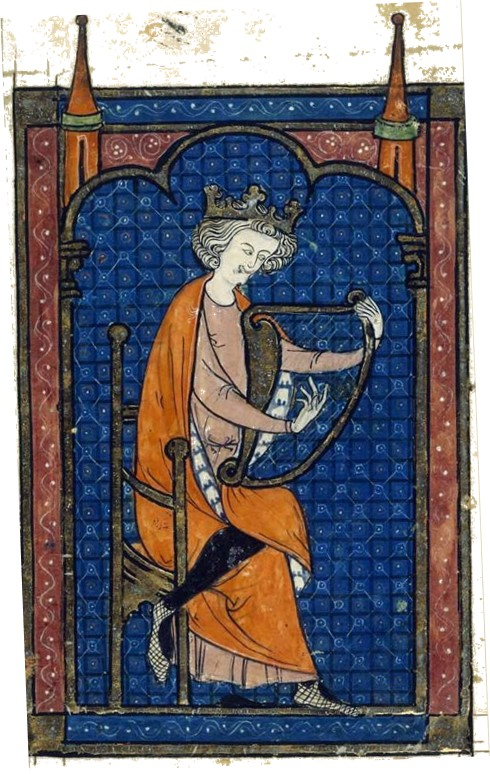 נבל דוד